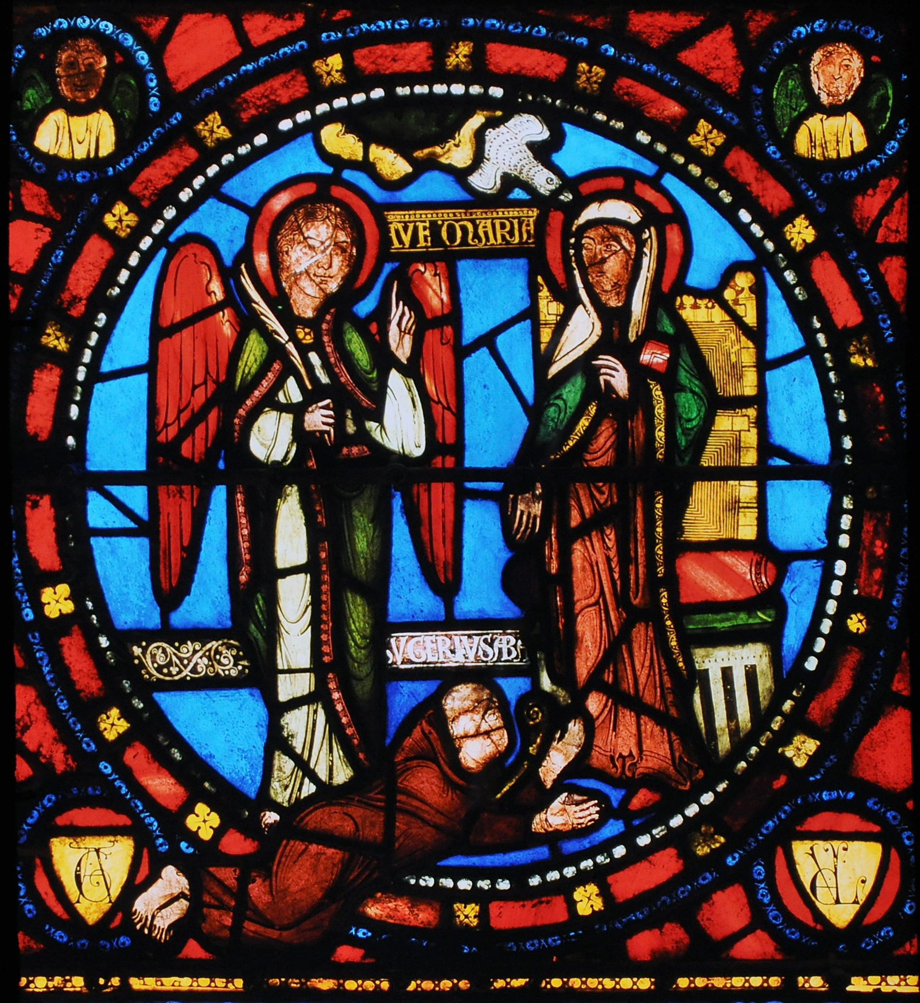 Vitrail de la Basilique Saint-Denis (chapelle de la Vierge). Vitrail de l'Enfance du Christ. l'Annonciation, par l'abbé Suger, 12ème siècle. L'abbé Suger est représenté aux pieds de la Vierge dans l'Annonciation, et son nom est indiqué.